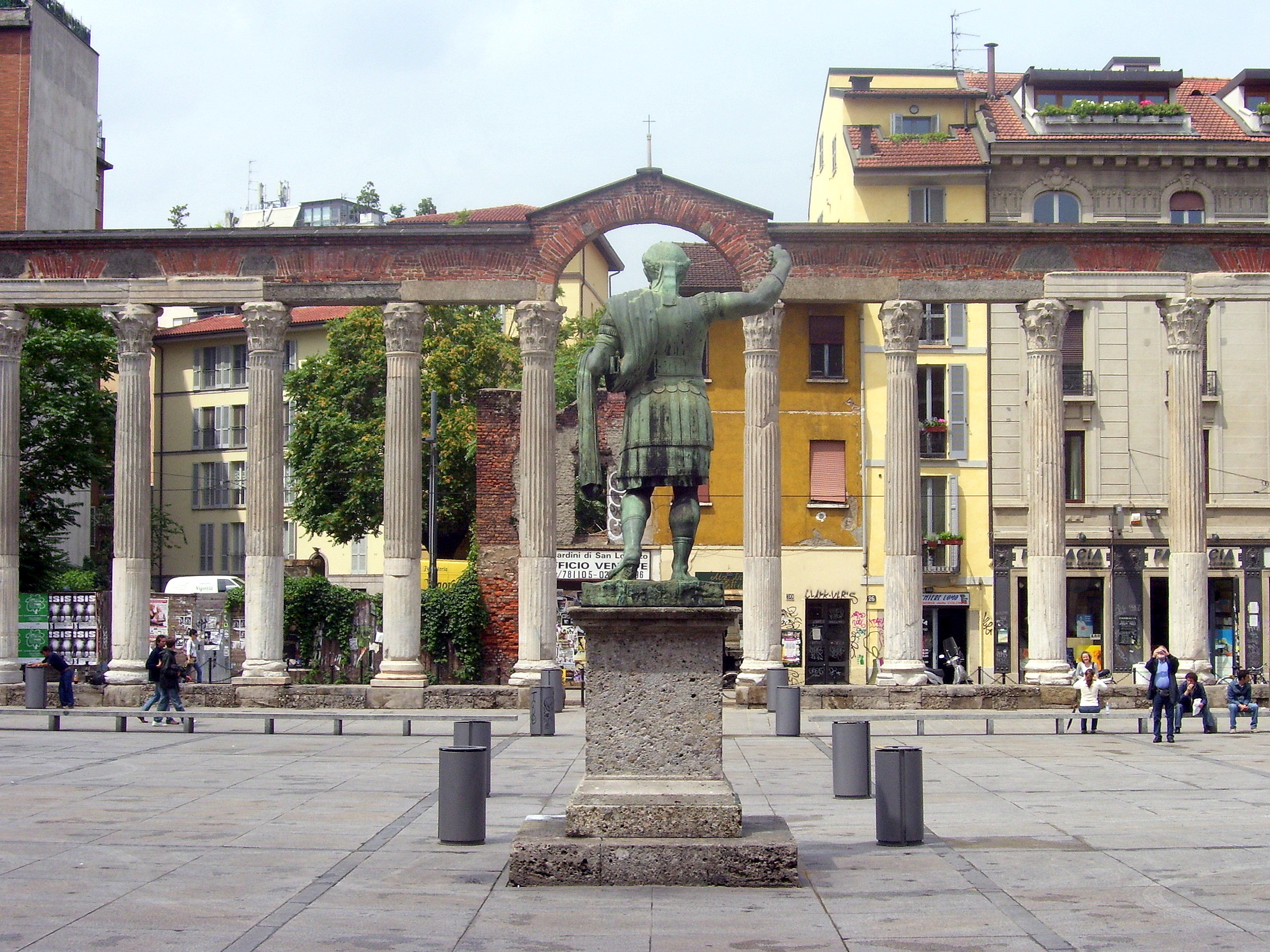 Colonne di San Lorenzo in Milan